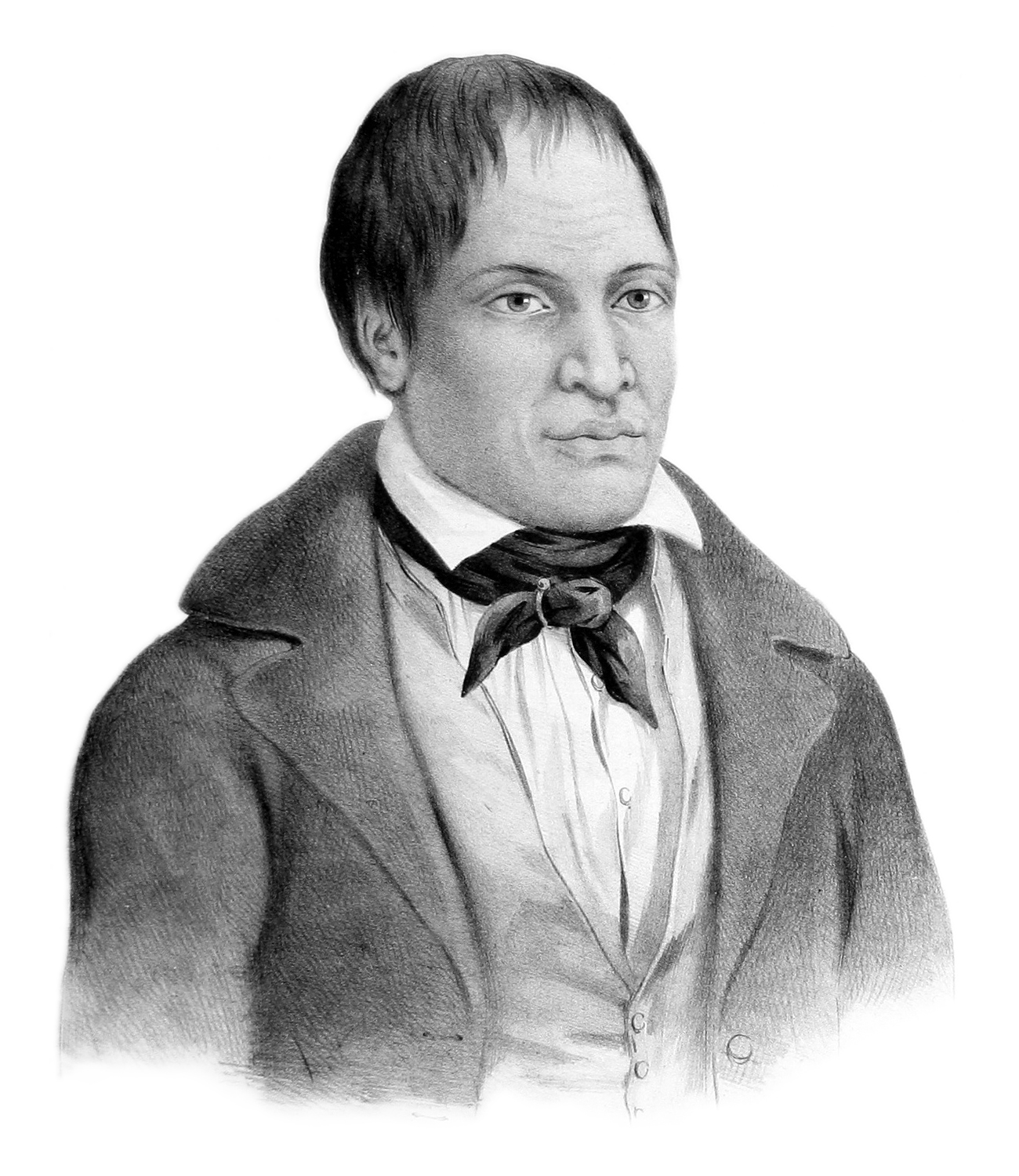 Mapou-Teoa. Atlas pittoresque, planche 48